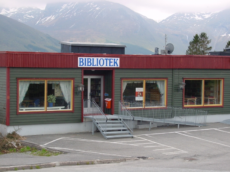 Eide bibliotek